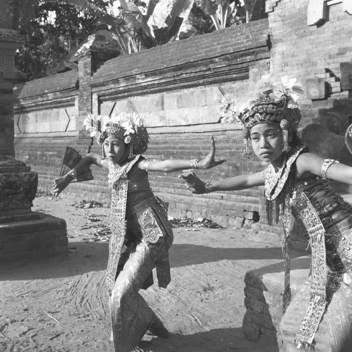 negatief. Legong danseressen, Saba